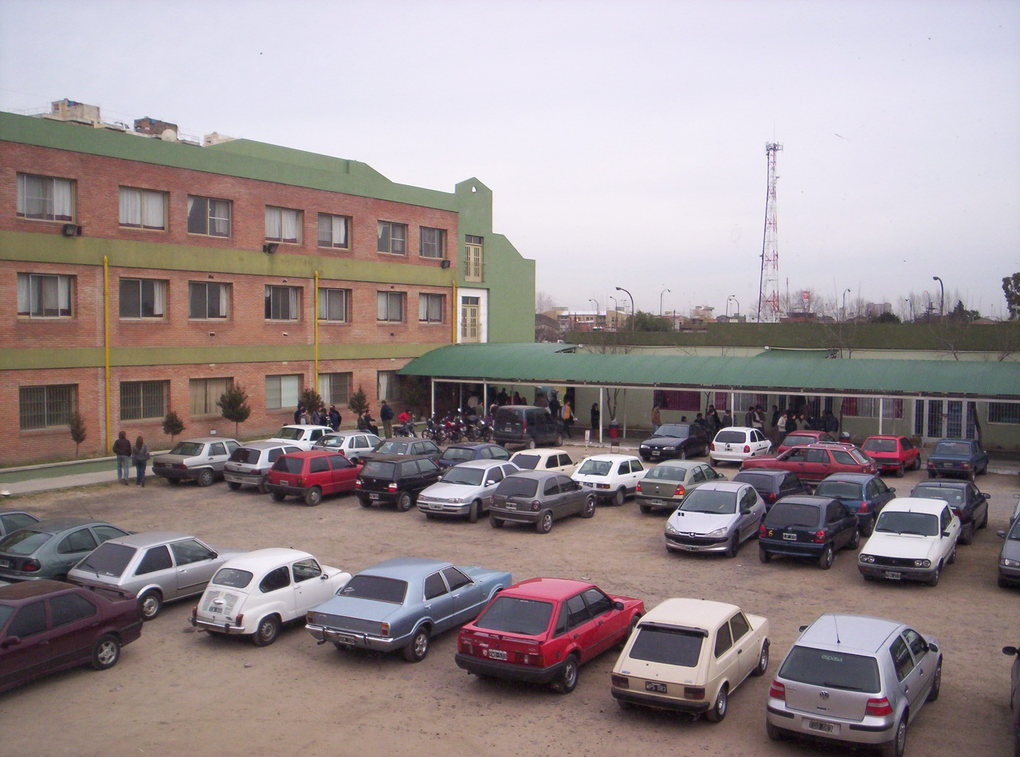 Vista parcial del Estacionamiento de la UTN-FRBA sede Campus.